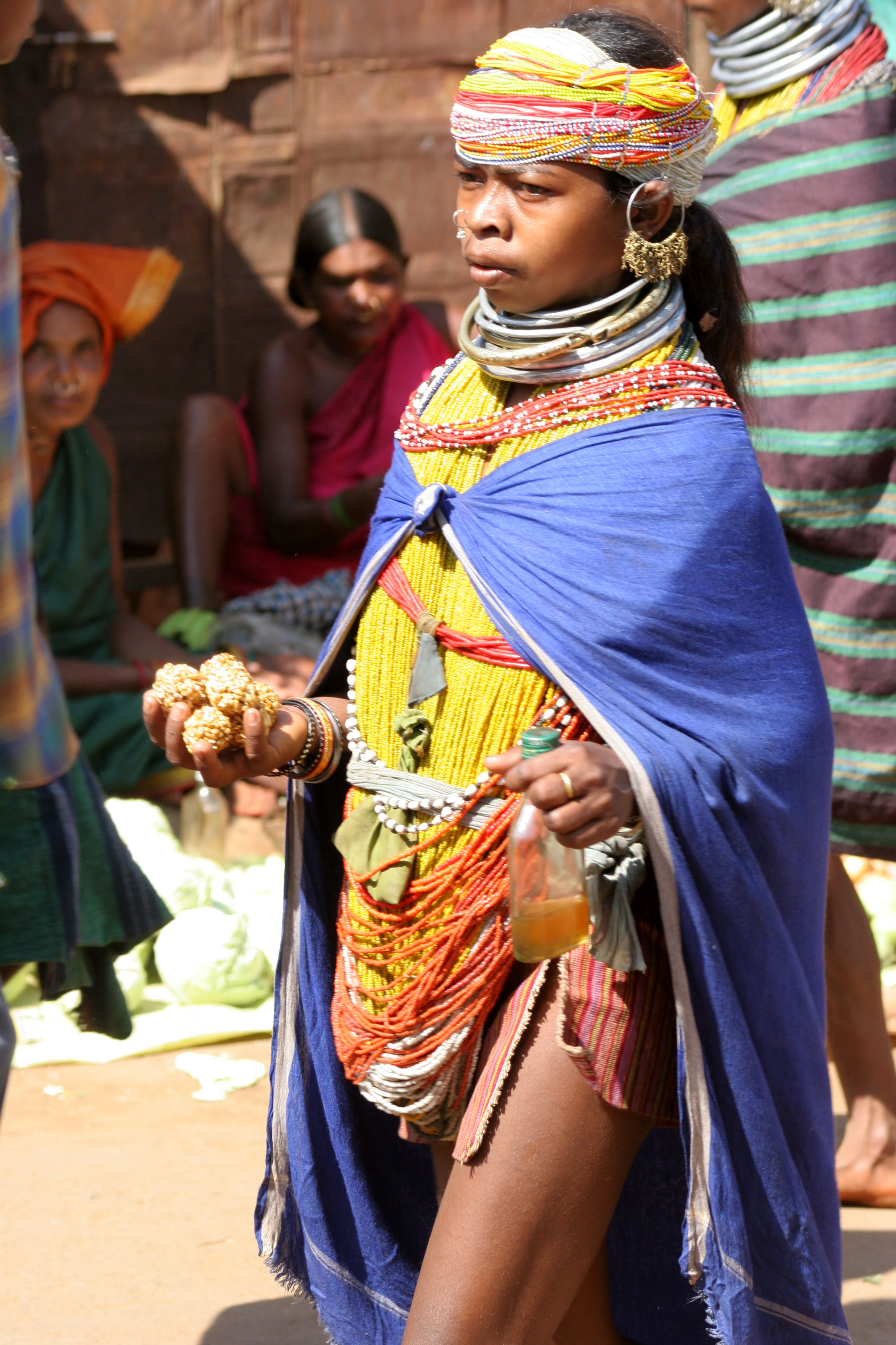 inde Chhattisgarh jeune fille bondo au marché